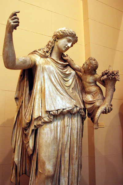 Eiréné (la Paix), une des trois Heures - filles de Thémis et Zeus - et Ploutos enfant, avec la corne d'abondance.